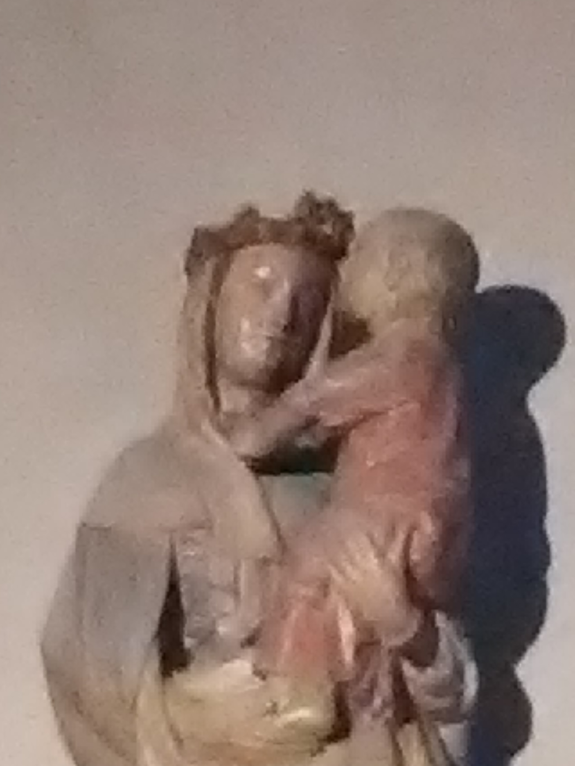 la vierge du Marthuret détail